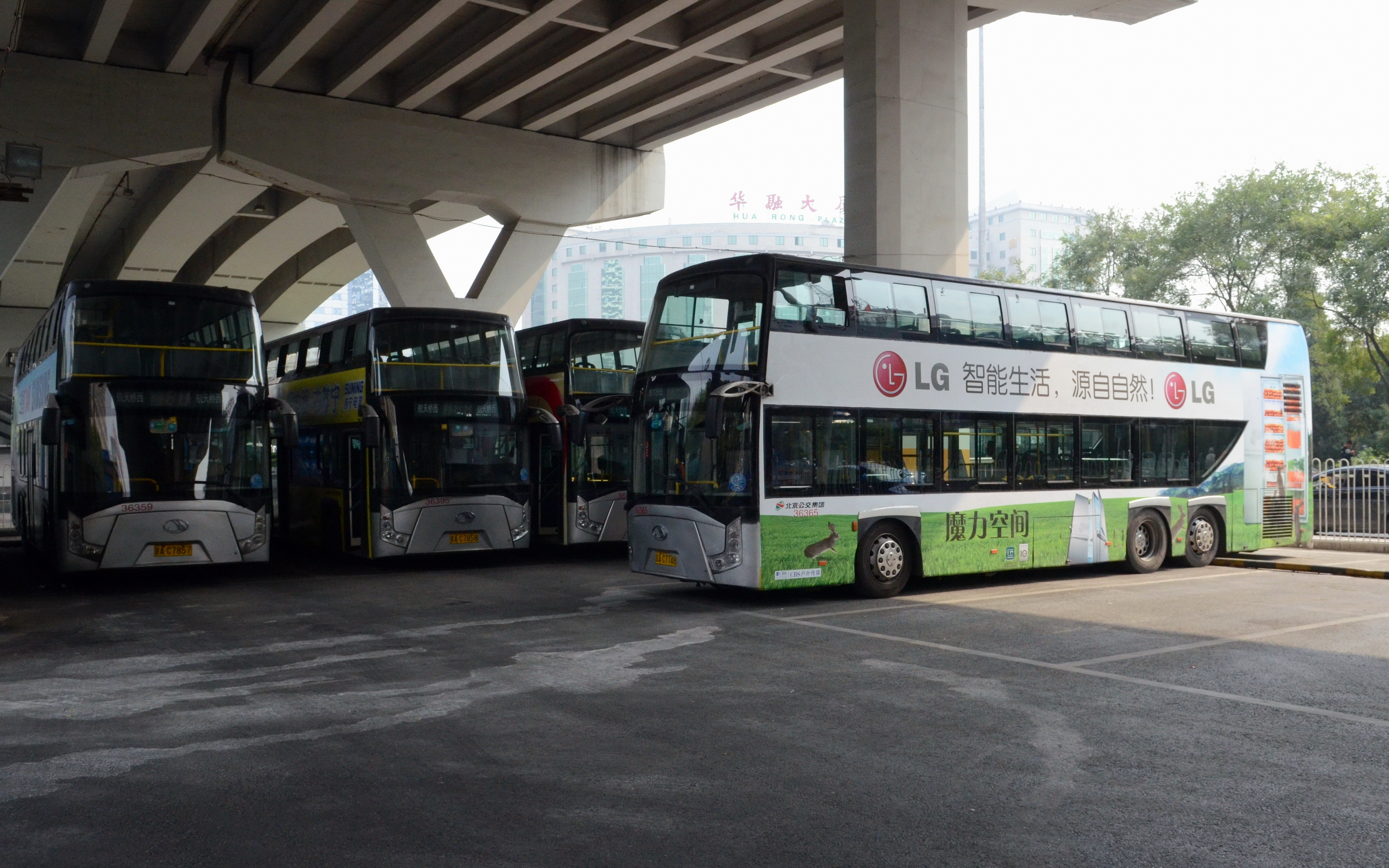 中文（中国大陆）: 北京公交特8路公交车使用京华BK6126S型双层客车，拍摄于北京公交航天桥西场站